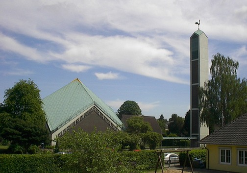 Johanneskirche (Friedrichsgabe) 2011